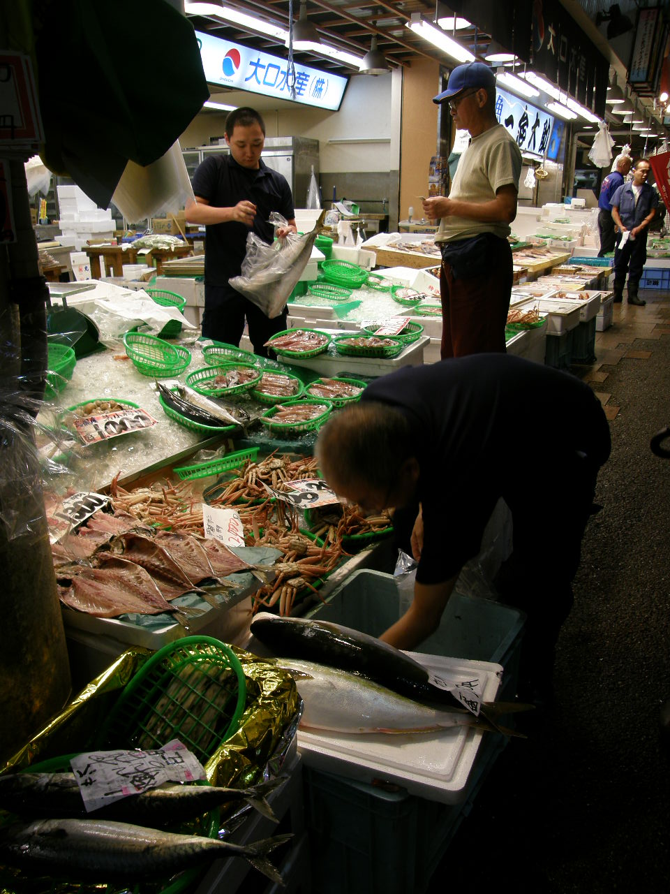 近江町市場（おうみちょういちば）は、石川県金沢市の中心部にある、主に生鮮食料品などの食品と生活雑貨を扱う小売店が主体の市場である。名前の由来は近江商人が作ったことによる[1]。地元ではおみちょ（「お」にアクセント）と呼び親しまれている。 市街地再開発事業により、2009年4月16日に近江町いちば館が開業した。むさし交差点（武蔵ヶ辻）の南東側一帯に位置し、繁華街の香林坊からも比較的近い。約2,8haの敷地に約170店の商店・飲食店が軒を連ねる。加賀蓮根、丸大根、金時草（きんじそう）などの加賀野菜を売っている店があり、加賀・能登の海産物や加工品なども揃う。